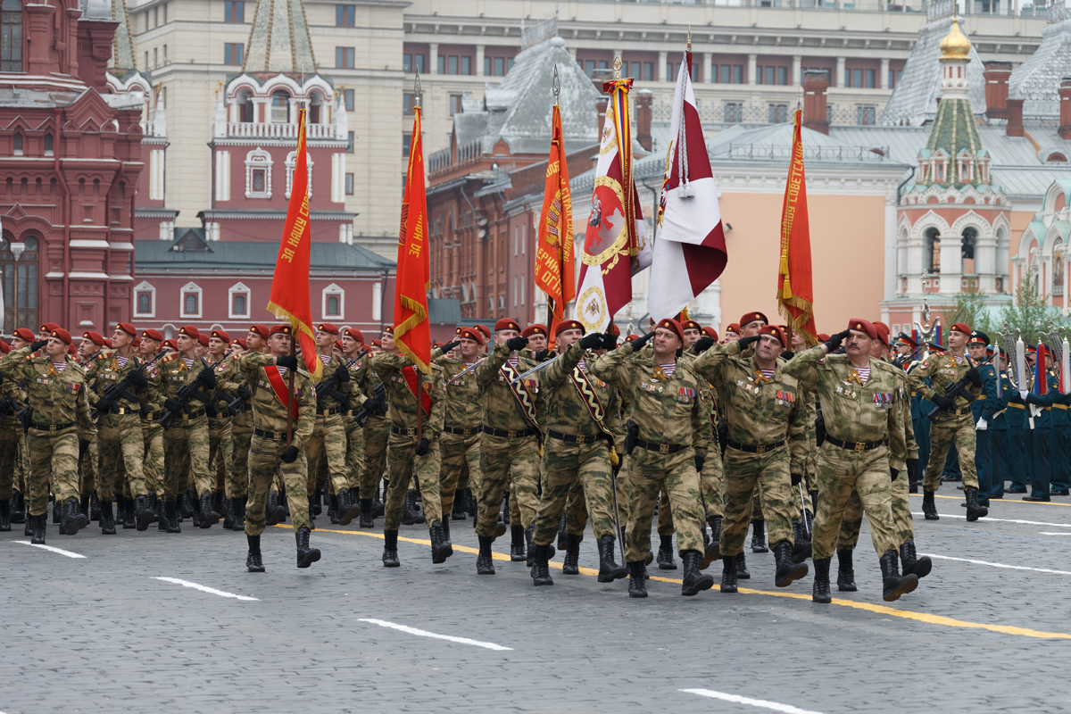 В Москве прошел парад в честь 74-й годовщины Победы в Великой Отечественной войне